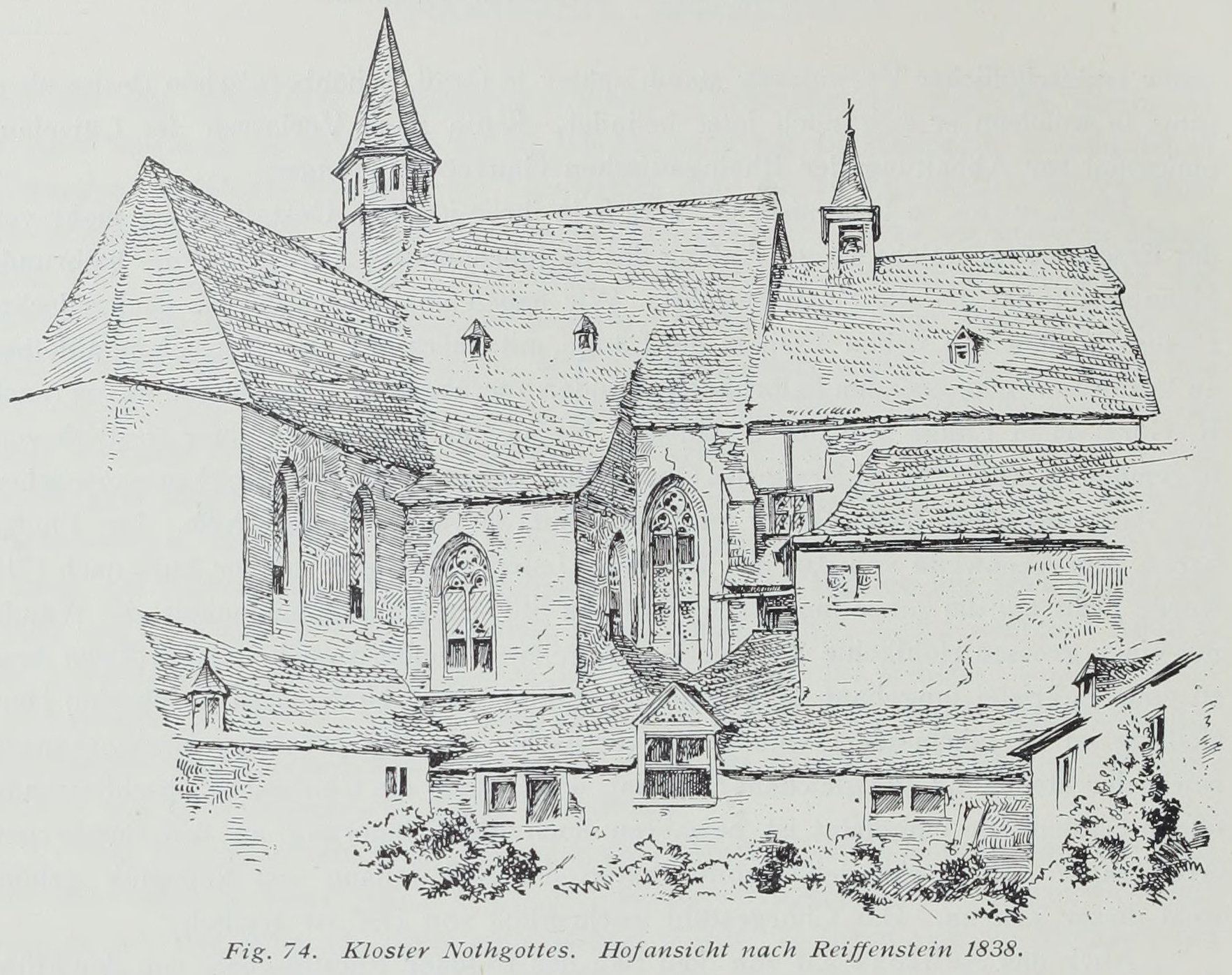 Kloster Nothgottes Hofansicht nach Reiffenstein 1838